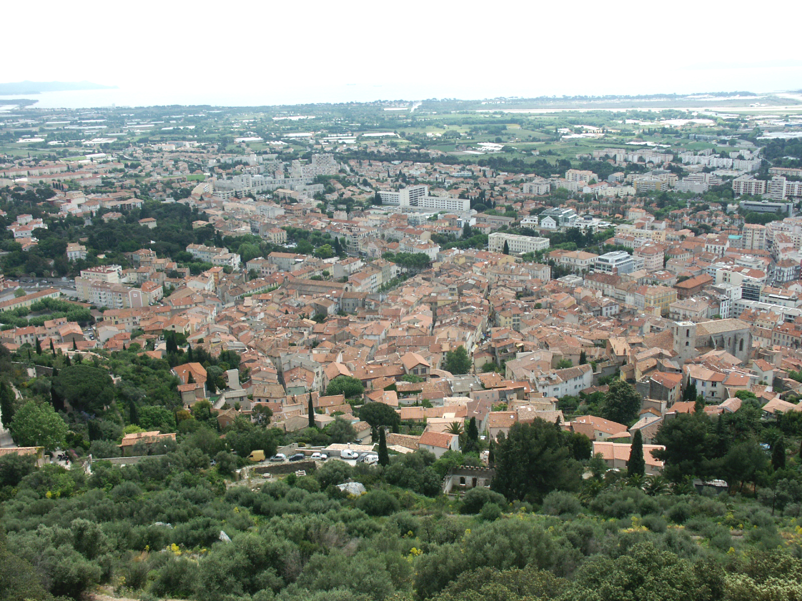 Hyères, la vieille ville vue depuis le point de vue du château. Sur la droite, l'église Saint-Paul.